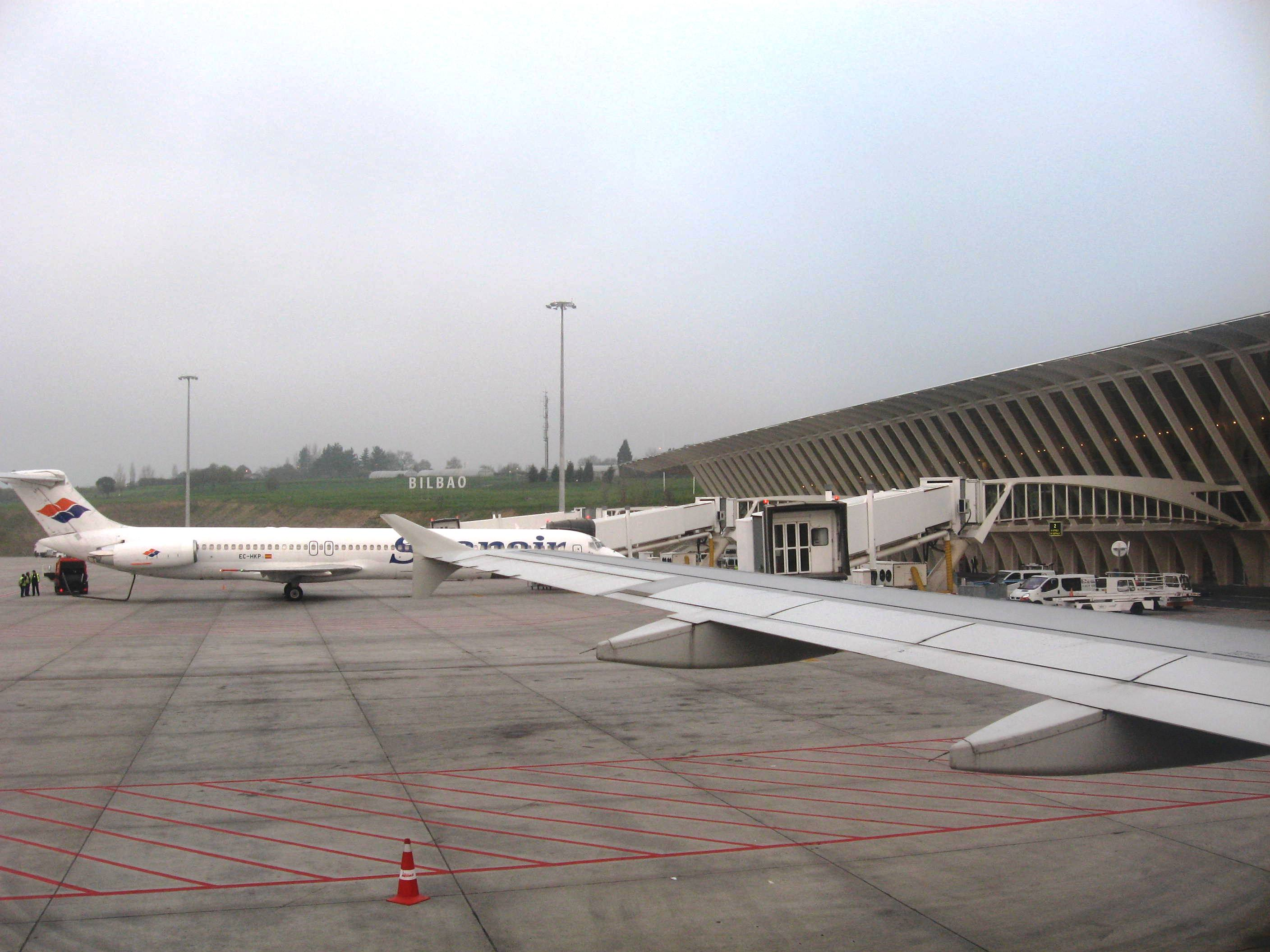 Desc: Aeropuerto de Bilbao.